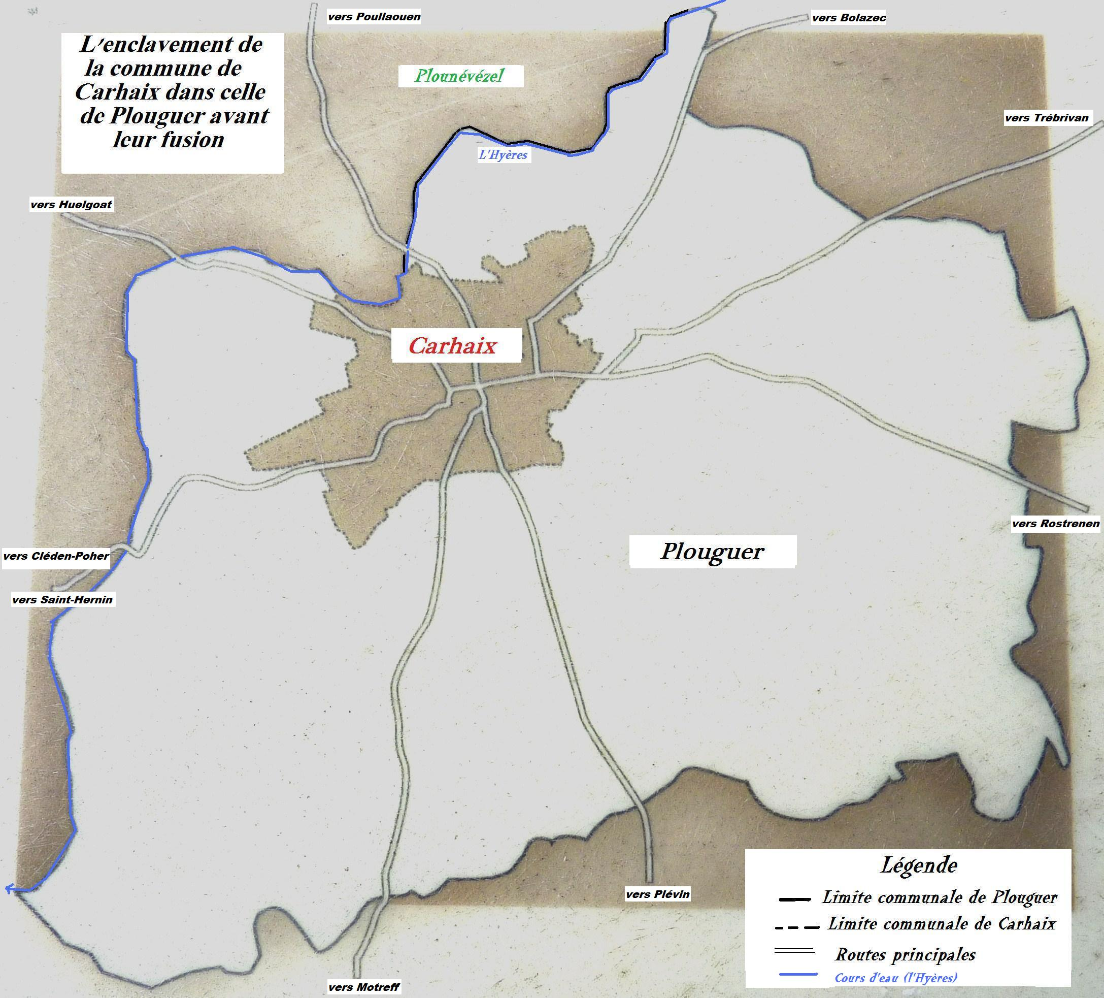 Carte de Carhaix et de Plouguer avant leur fusion pour former Carhaix-Plouguer